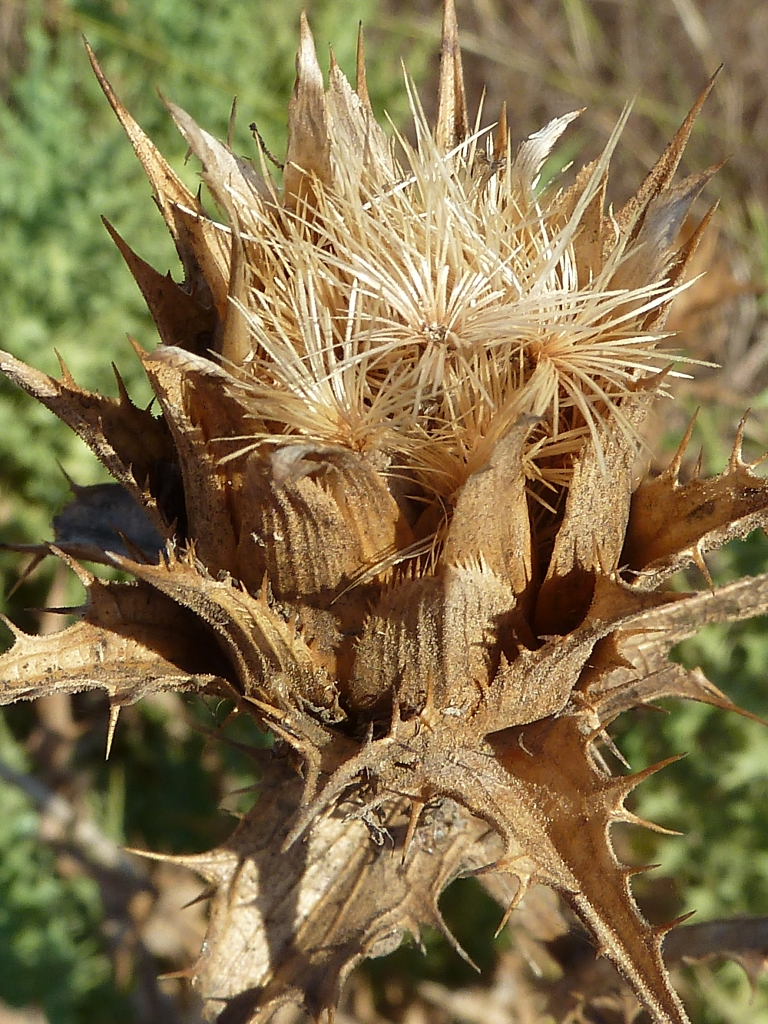 Carthamus arborescens (Cardo cabrero) : Cipselas in situ en un capítulo post antesis - Camino de la Azarbe de Patricio Este, Albatera (Alicante, España).